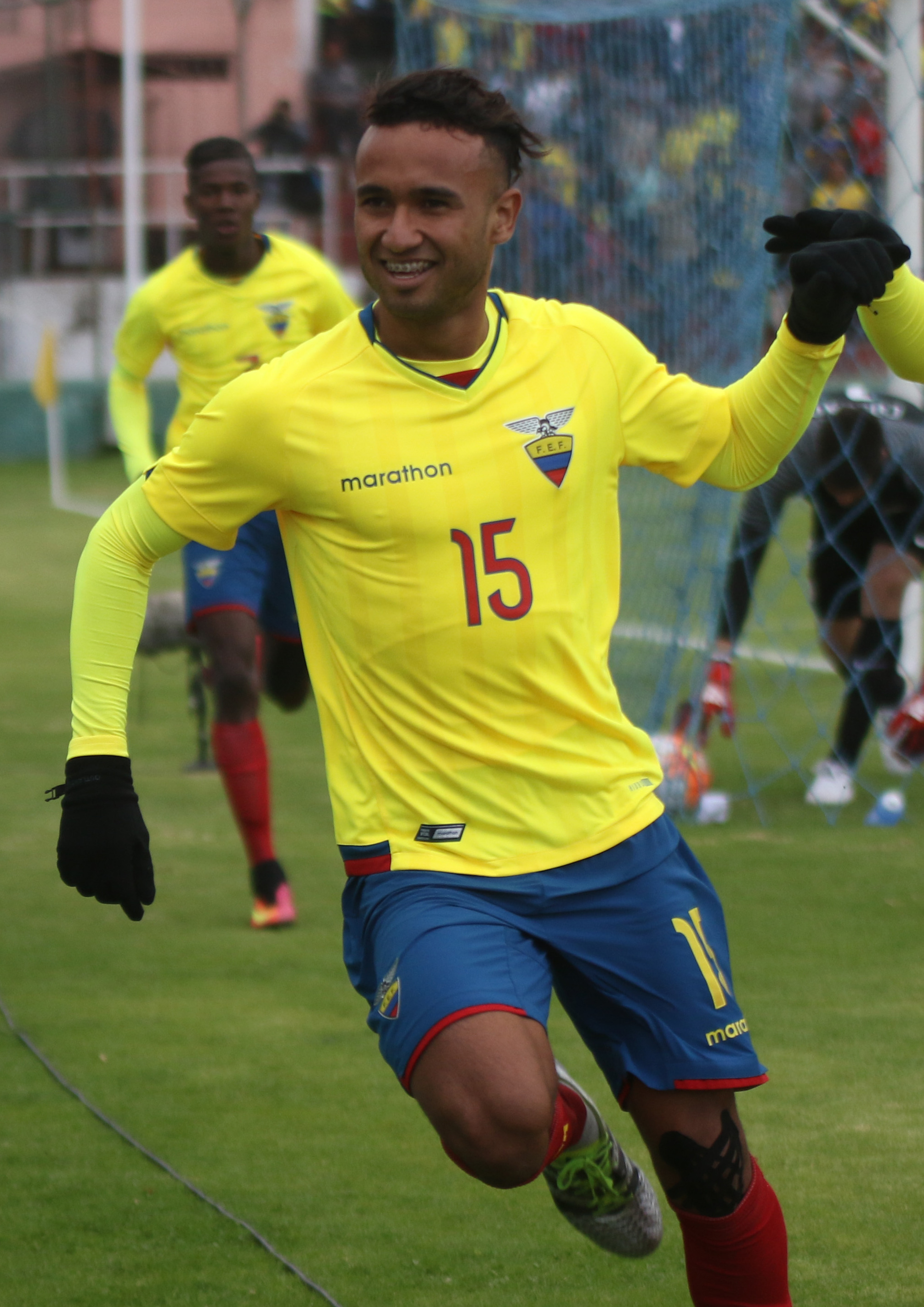 Ambato, Ecuador, 22 enero 2017 (Andes).- Ecuador igualó 1-1 este domingo con Chile en la ciudad de Ambato y dejó vivas las posibilidades de clasificar a la fase final del Campeonato Sudamericano Sub 20 del que es anfitrión, y se alista desde ya para jugar con Paraguay en la última jornada, el jueves próximo, en la ciudad ecuatoriana de Ríobamba. ANDES/Micaela Ayala V.